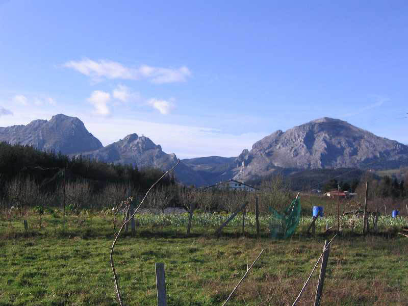 Montaña Aitz Txiki Abadiano, Vizcaya, País Vasco, España.